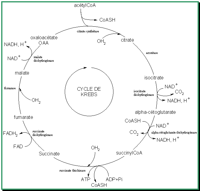 cycle de Krebs Image058.gif